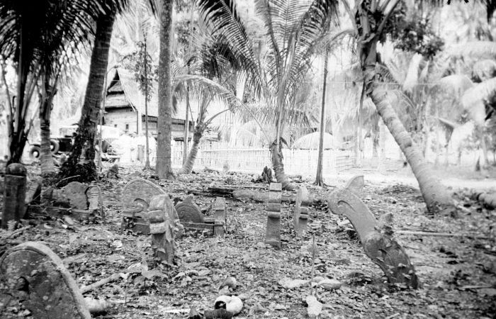 Negatief. Een oude begraafplaats met typische grafstenen bij Toebo in het landschap Tjenrana in Mandar, Zuid Celebes